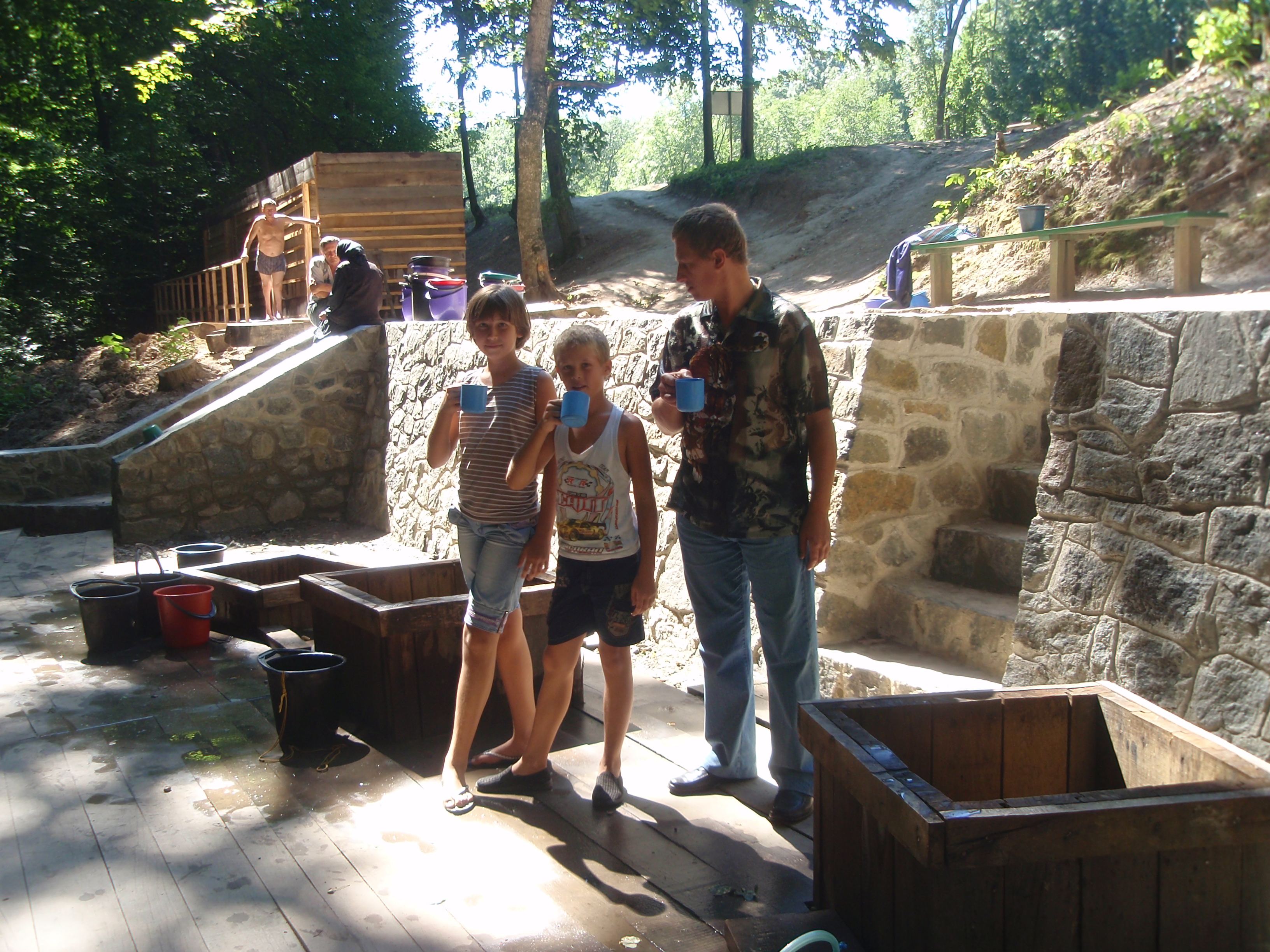 Криниці з святою водою на території Лебединського монастиря